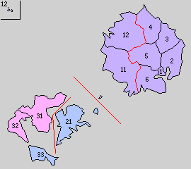 後の島根県隠岐郡域の島嶼町村制時点の町村。